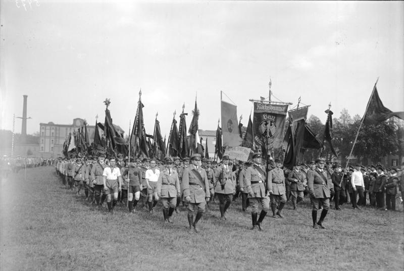 Der große Reichsbanner-Gau-Tag in Brandenburg a/Havel. Zu dem großen Reichsbannertreffen in Brandenburg waren über zehntausend Reichsbannerleute erschienen. Der Anmarsch der schwarz-rot-goldenen Fahnen auf dem Festplatz.